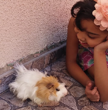 Porquinho-da-Índia da raça angorá com sua dona.